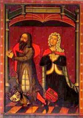 Als Tafelbild des Lübecker Ratsherrn Johann Crispin (d. 1442) und seiner Ehefrau Taleke Kerkring falsch beschrieben, richtig der Lübecker Bürgermeister Segebodo Crispin gestorben 1332 mit seiner ersten Ehefrau, einer geborenen Güstrow, identifizierbar durch ihr Familienwappen.